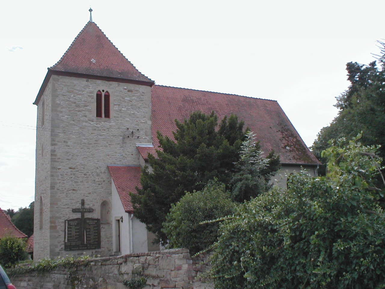 Bergkirche in heinsheim, erstmals erwähnt im Jahr 965.